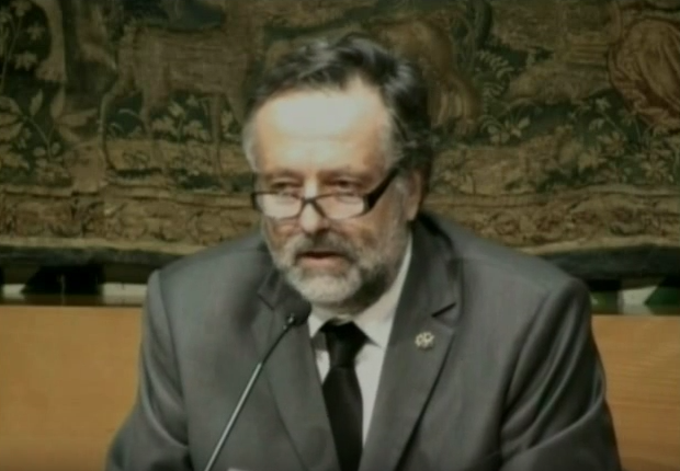 El 26 d'octubre de 2015 es va celebrar, a la Sala Prat de la Riba, la inauguració del curs 2015-16 de l'IEC. L'acte va ser presidit per Joandomènec Ros, president de l’Institut, i hi va intervenir Jusèp Loís Sans, president de l’Institut d’Estudis Aranesi. Jordi Casanova, membre de la Secció de Ciències Biològiques de l’IEC, va pronunciar la lliçó inaugural, amb el títol 'Animals, tanmateix'. La sessió va incloure el recital de la pianista Alba Ventura en homenatge a Enric Granados, en el centenari de la seva mort.